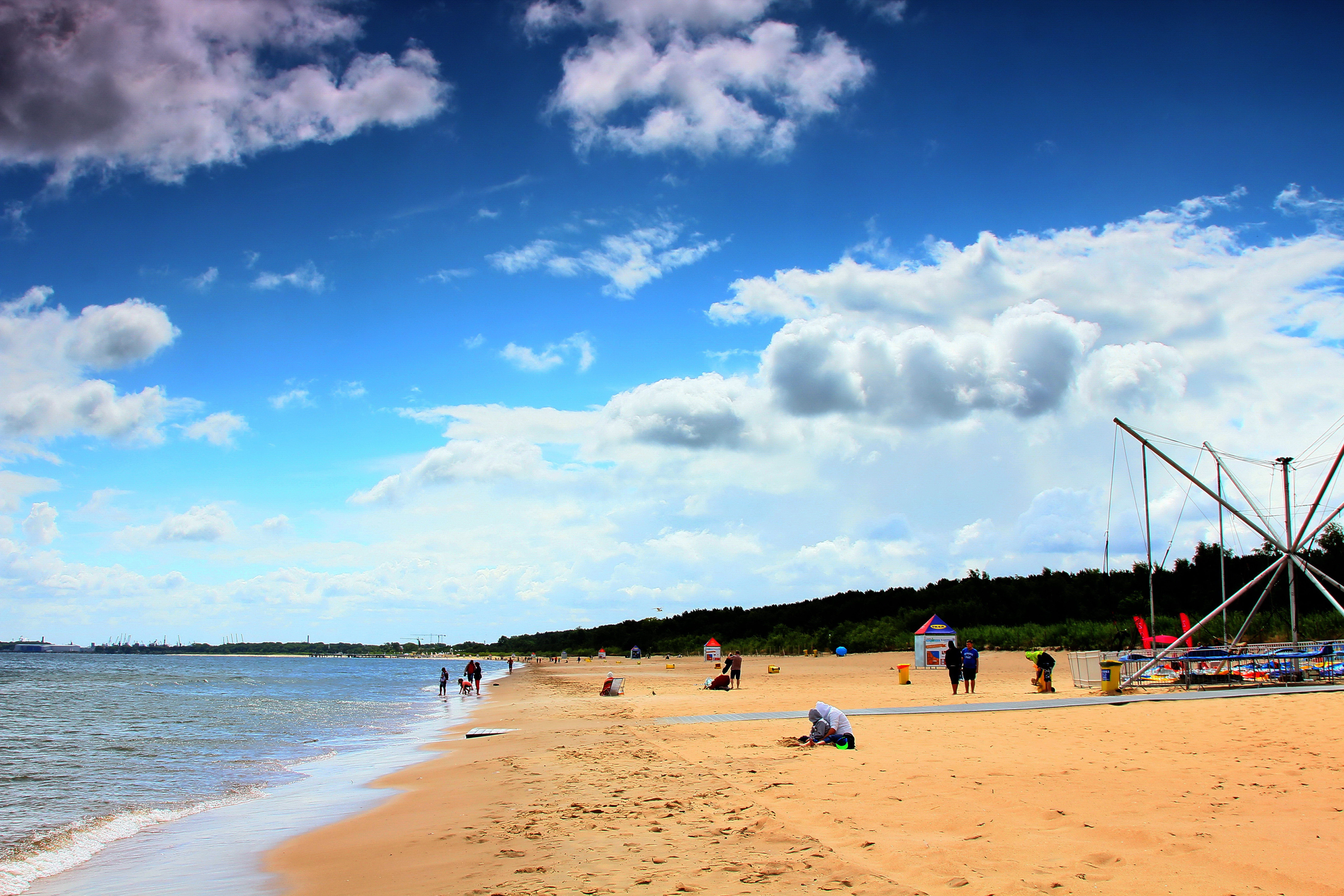 Gdańsk. Plaża w Jelitkowie.